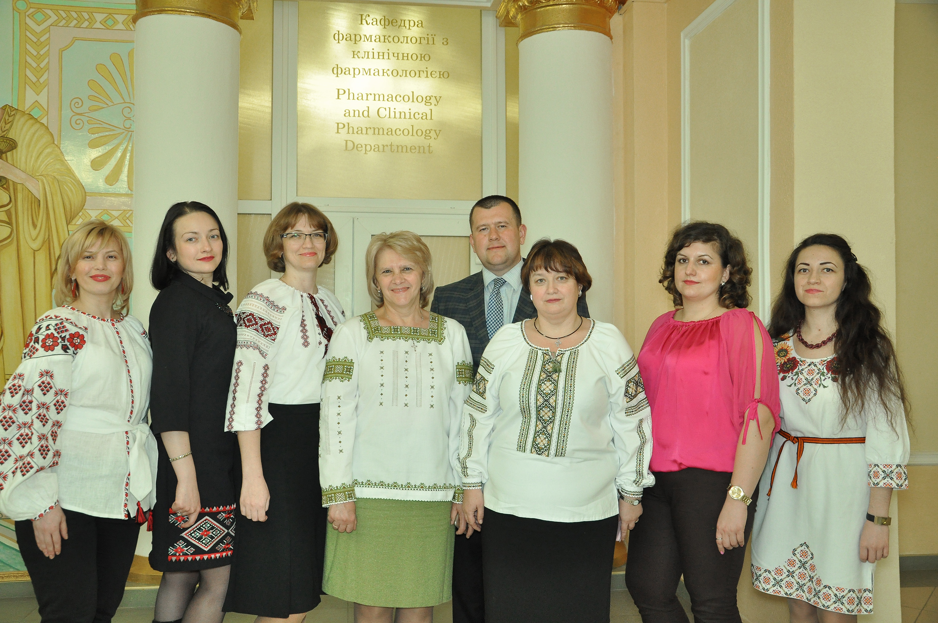 Колектив кафедри фармакології з клінічною фармакологією Тернопільського державного медичного університету імені І. Я. Горбачевського. Зліва направо: доцент кафедри, кандидат медичних наук Оксана Шевчук, доцент кафедри, кандидат біологічних наук Аліна Вольська, не визначено, доцент кафедри, кандидат медичних наук Ірина Мосейчук, доцент кафедри, кандидат фармацевтичних наук Віктор Пида, завідувач кафедри, доктор медичних наук Олександра Олещук, асистент кафедри Христина Курило, асистент кафедри, кандидат медичних наук Яна Іванків.